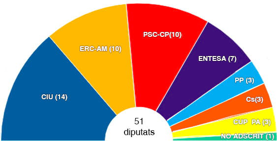 Composició dels partits polítics del ple de la Diputació de Barcelona en el mandat de 2015-2019